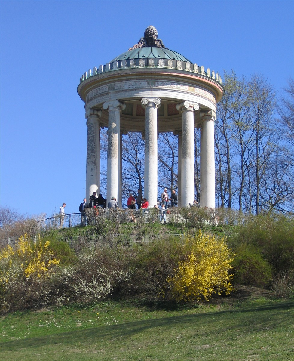 Monopteros, Englischer Garten, München